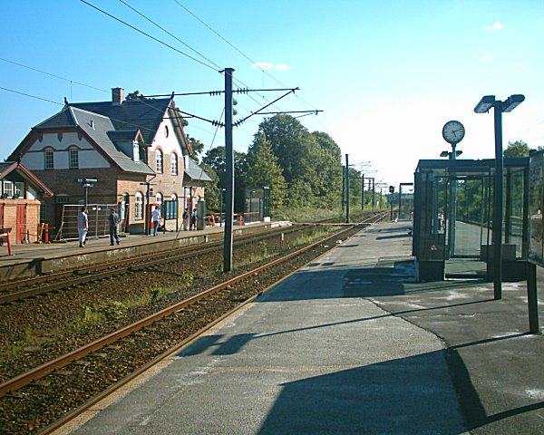 Nivå Station, Nivå on 30/07/04.